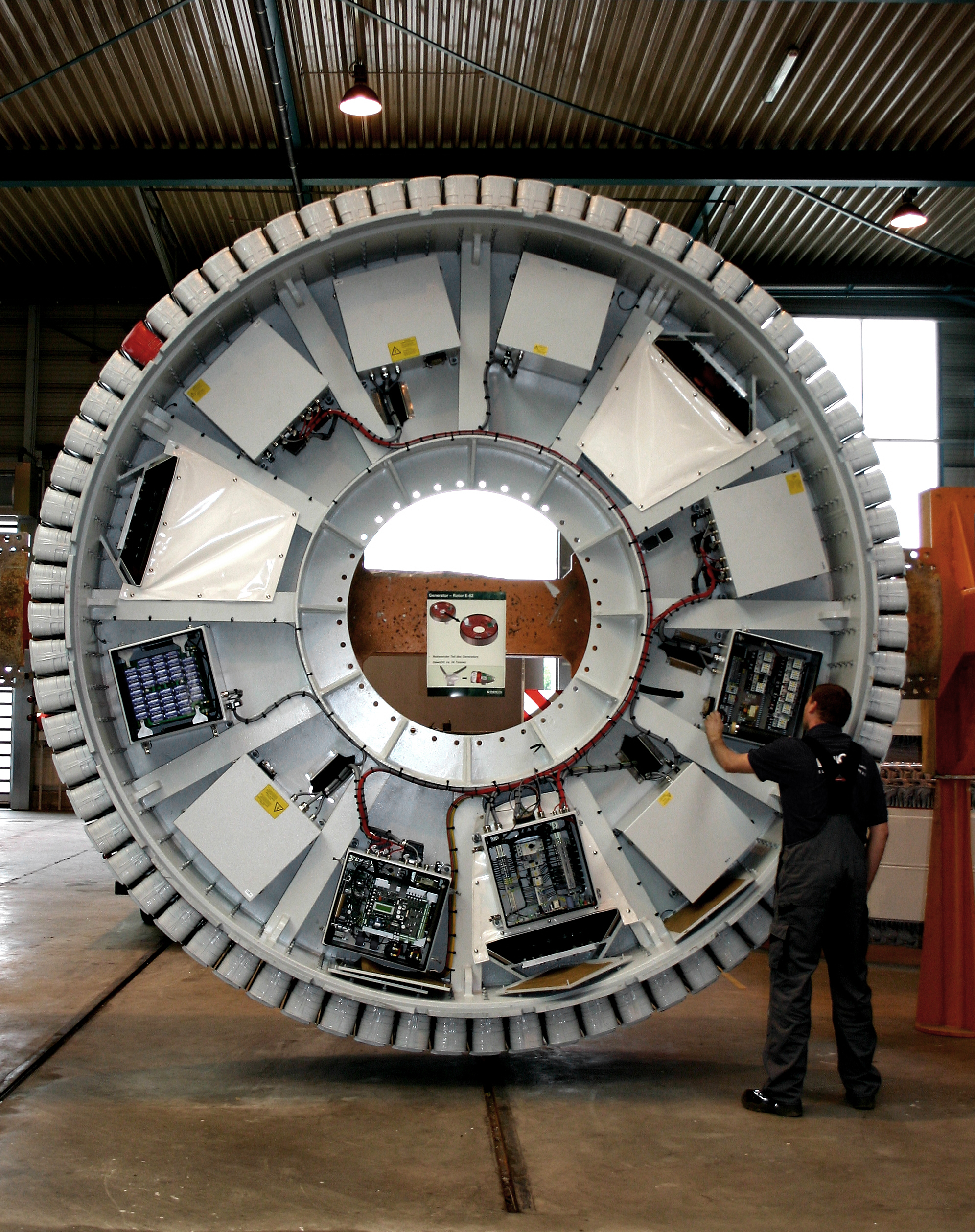 Rotor (Generator) einer Windenergieanlage, Person zum Größenvergleich